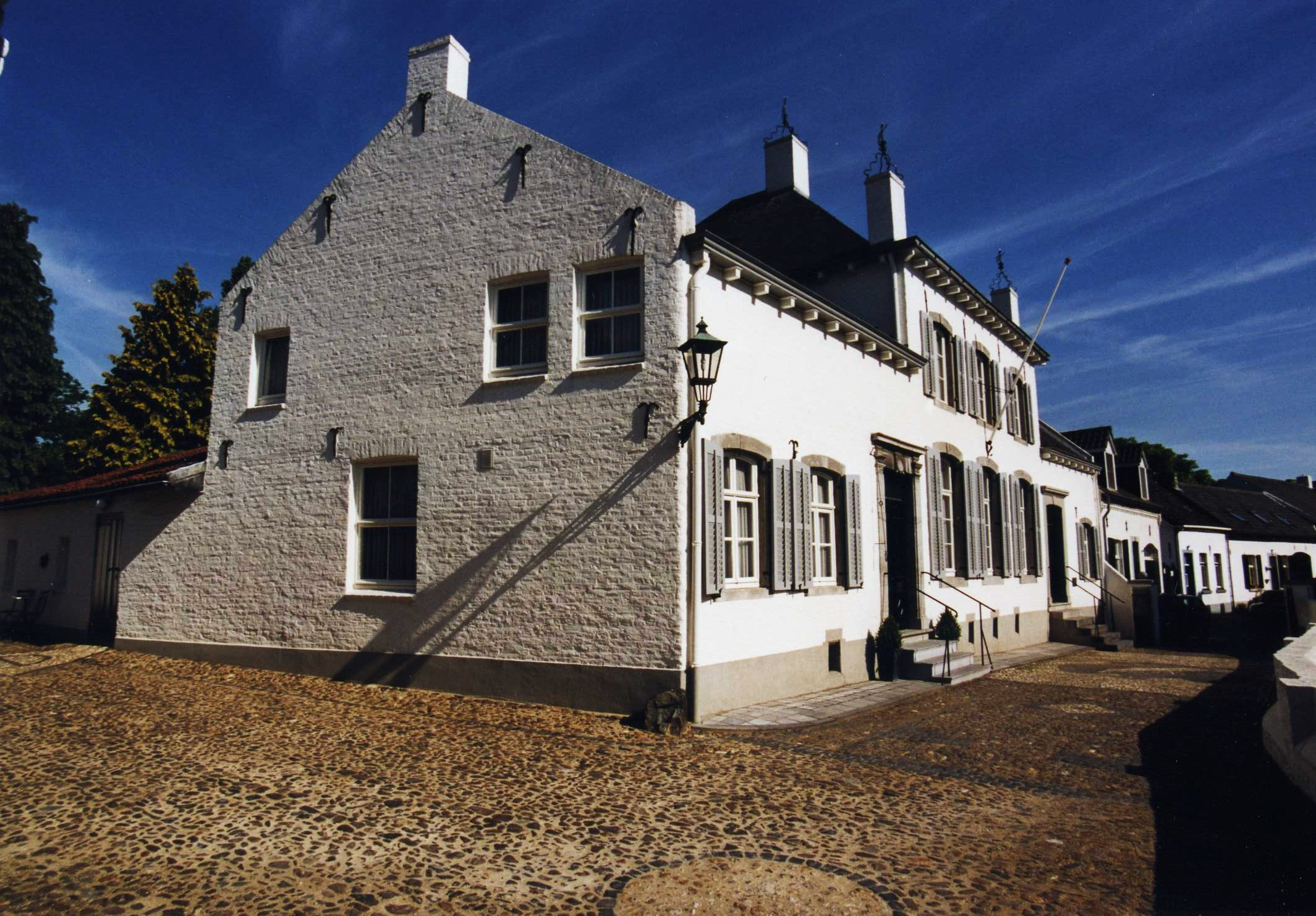 Huis de Kraak te Thorn.